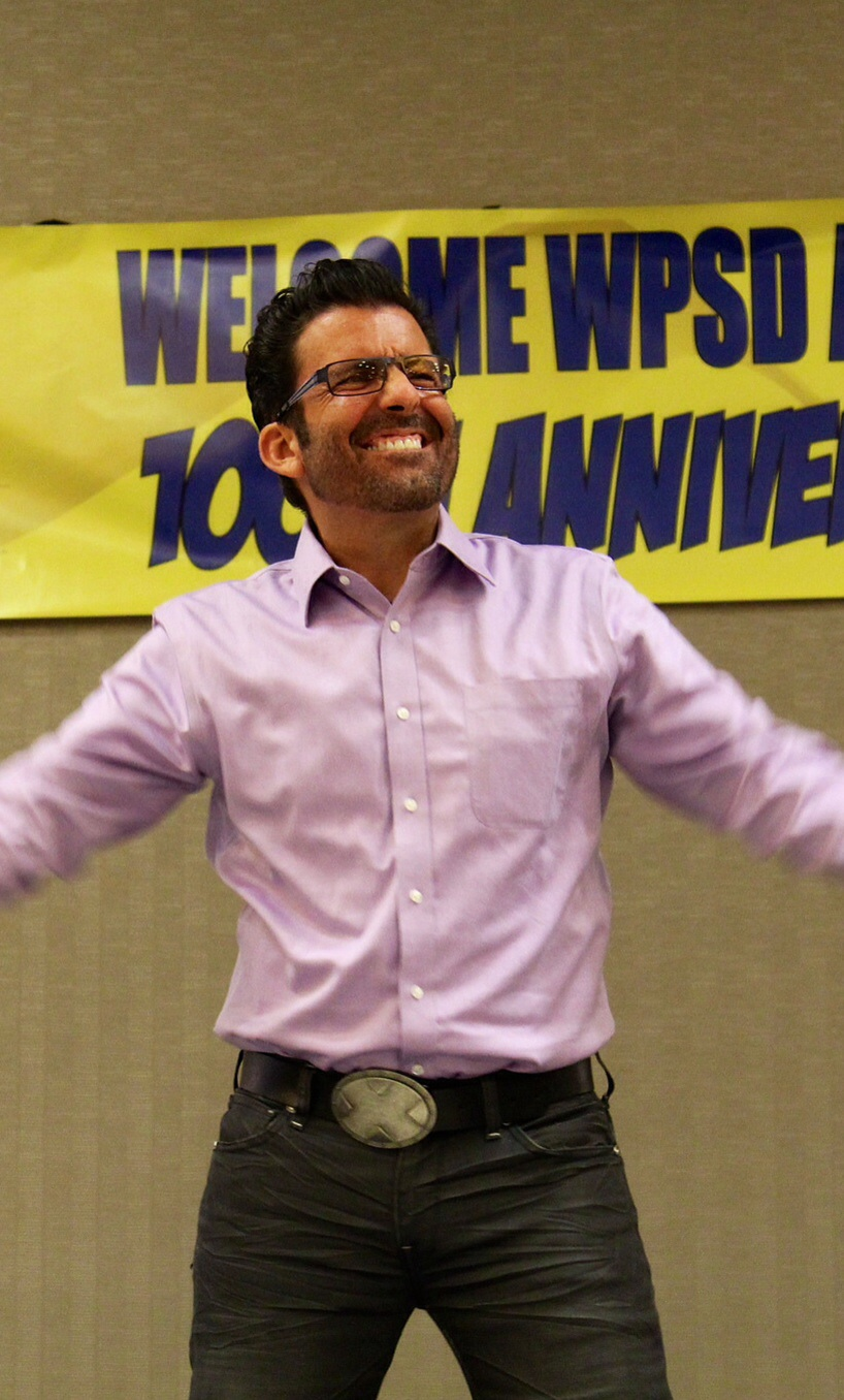 John pendant une fête